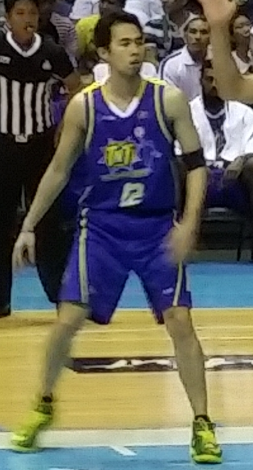 Larry Fonacier - TNT - 2015-1206